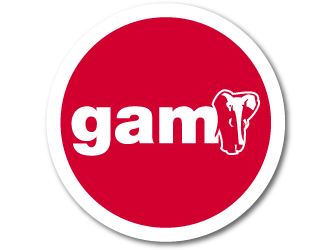 Logo del grupo GAM, General de Alquiler de Maquinaria S.A.